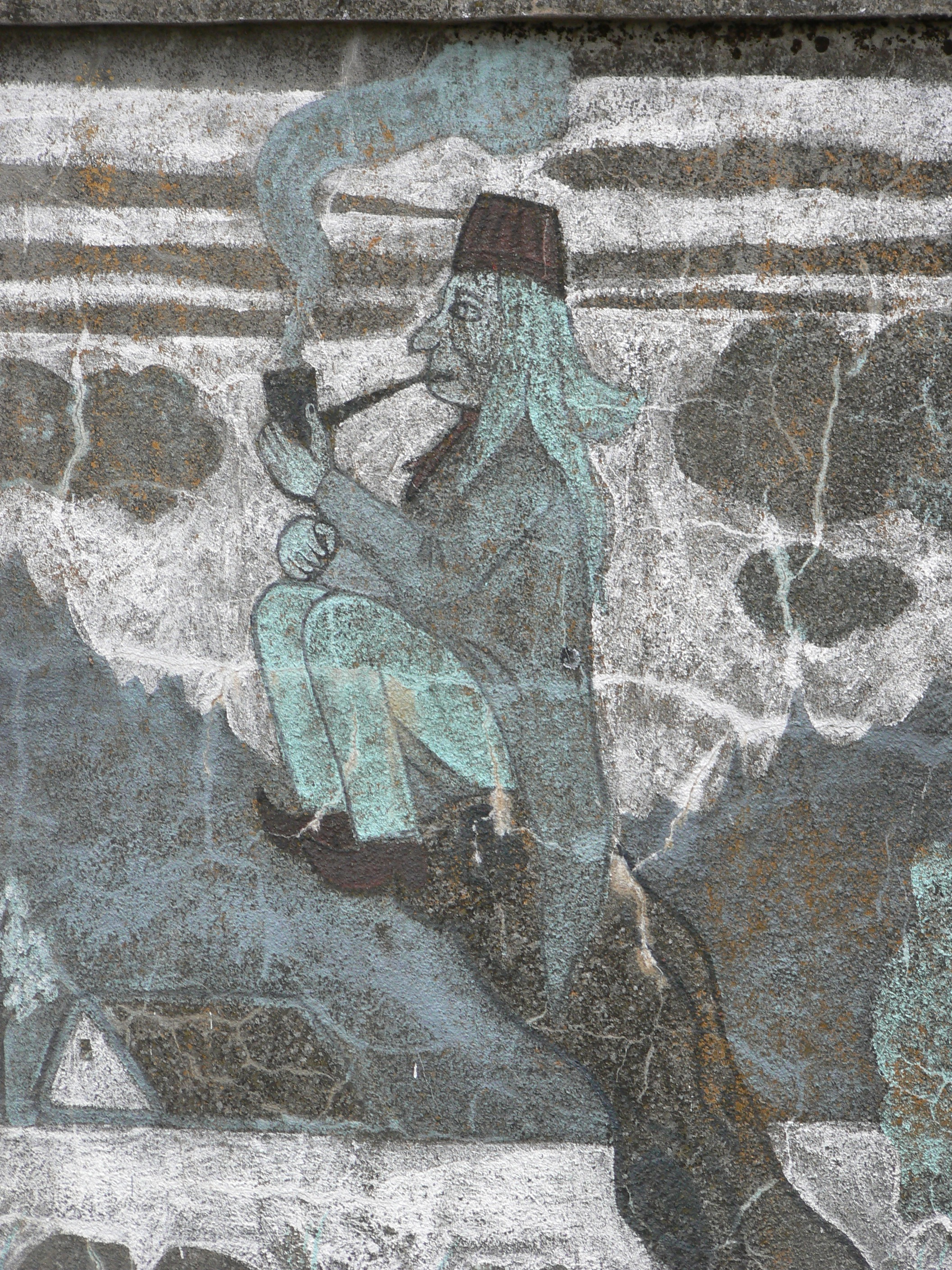 Splav7